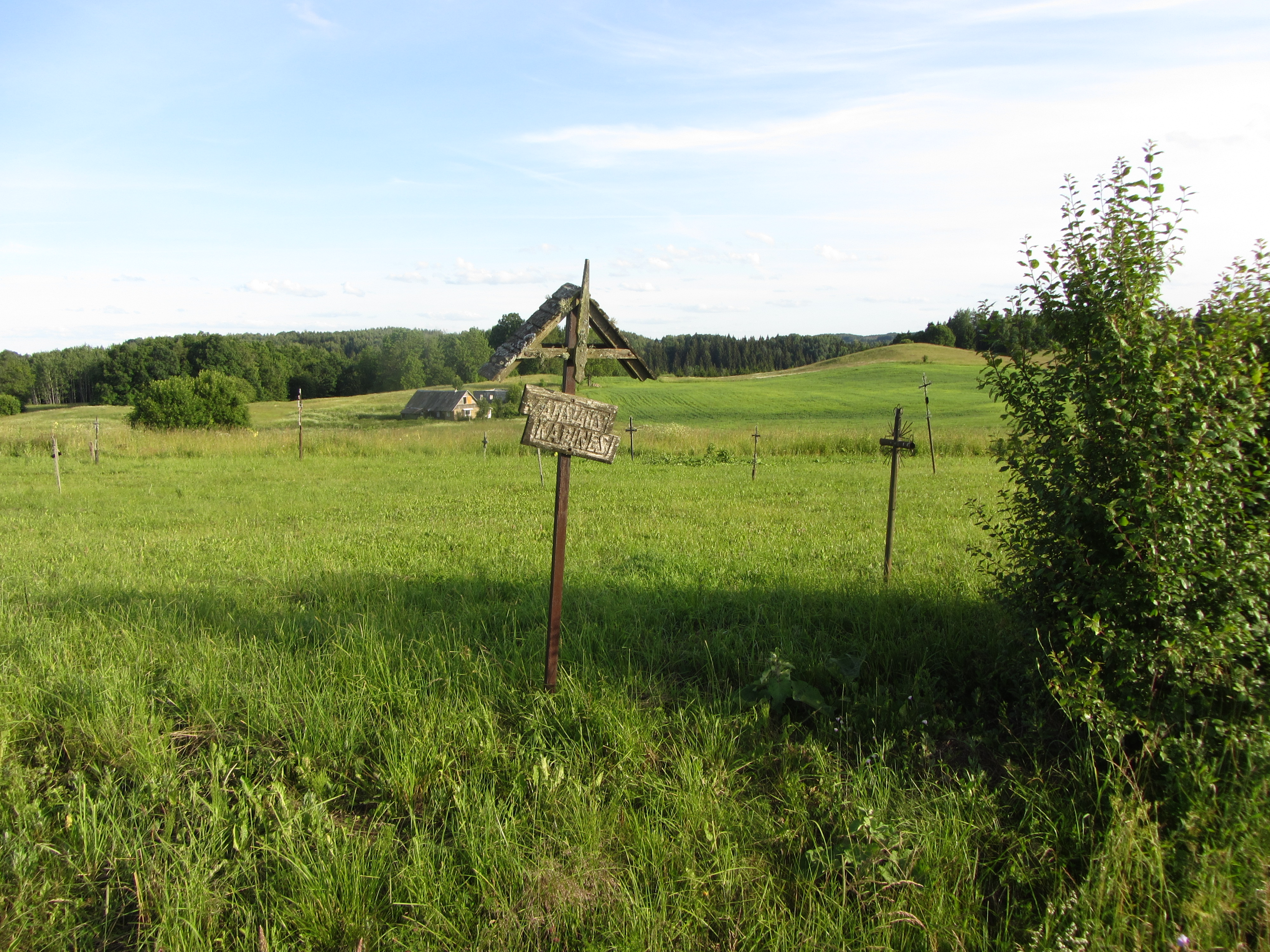 Ceikinių sen., Lithuania